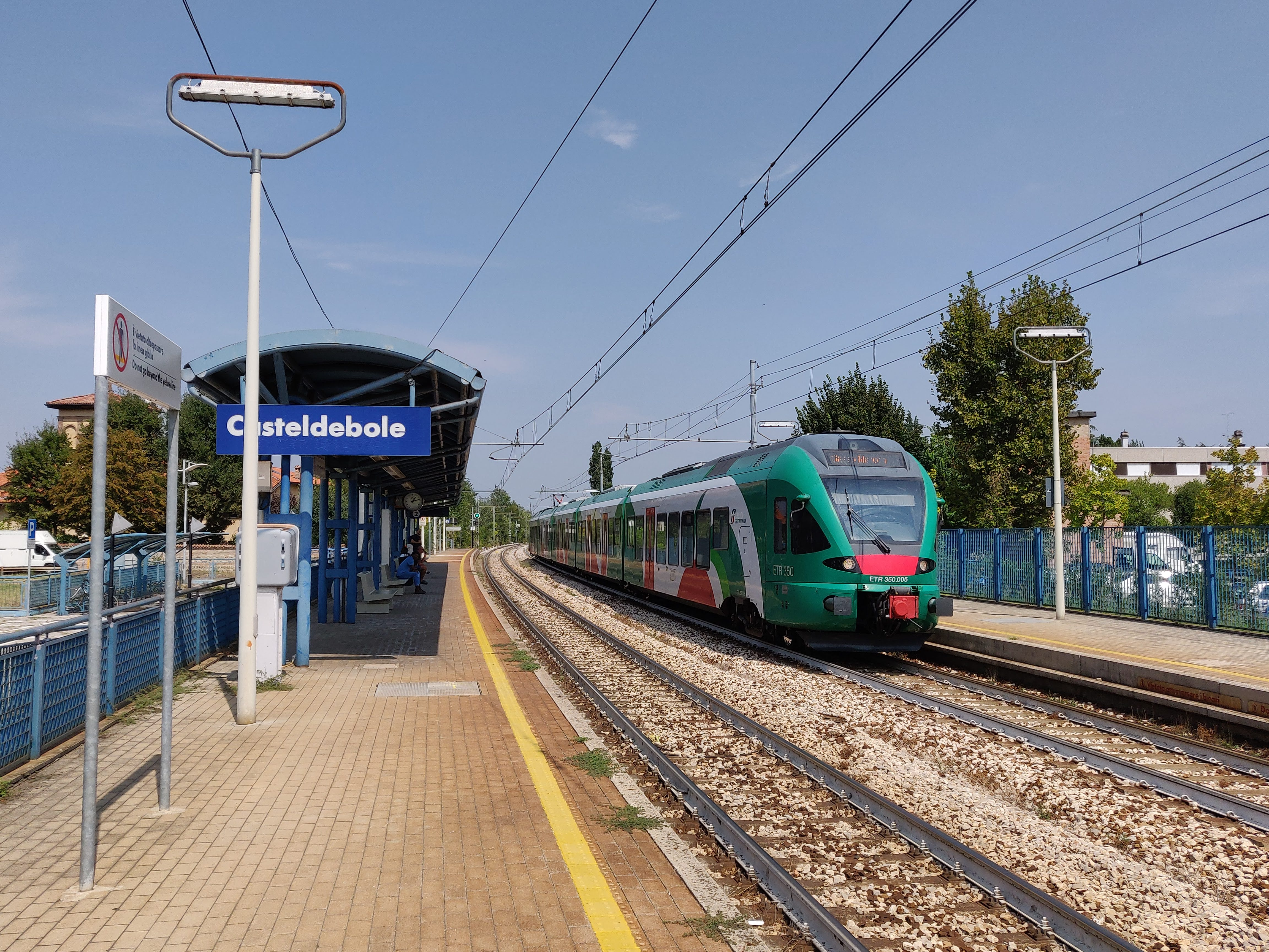 Stazione ferroviaria di Casteldebole, a Bologna. Al binario 1 è fermo il regionale 34193, proveniente da Bologna Centrale e diretto a Sasso Marconi.